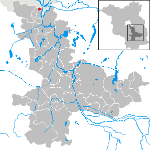 Eichwalde in Brandenburg (Country) - District Dahme-Spreewald